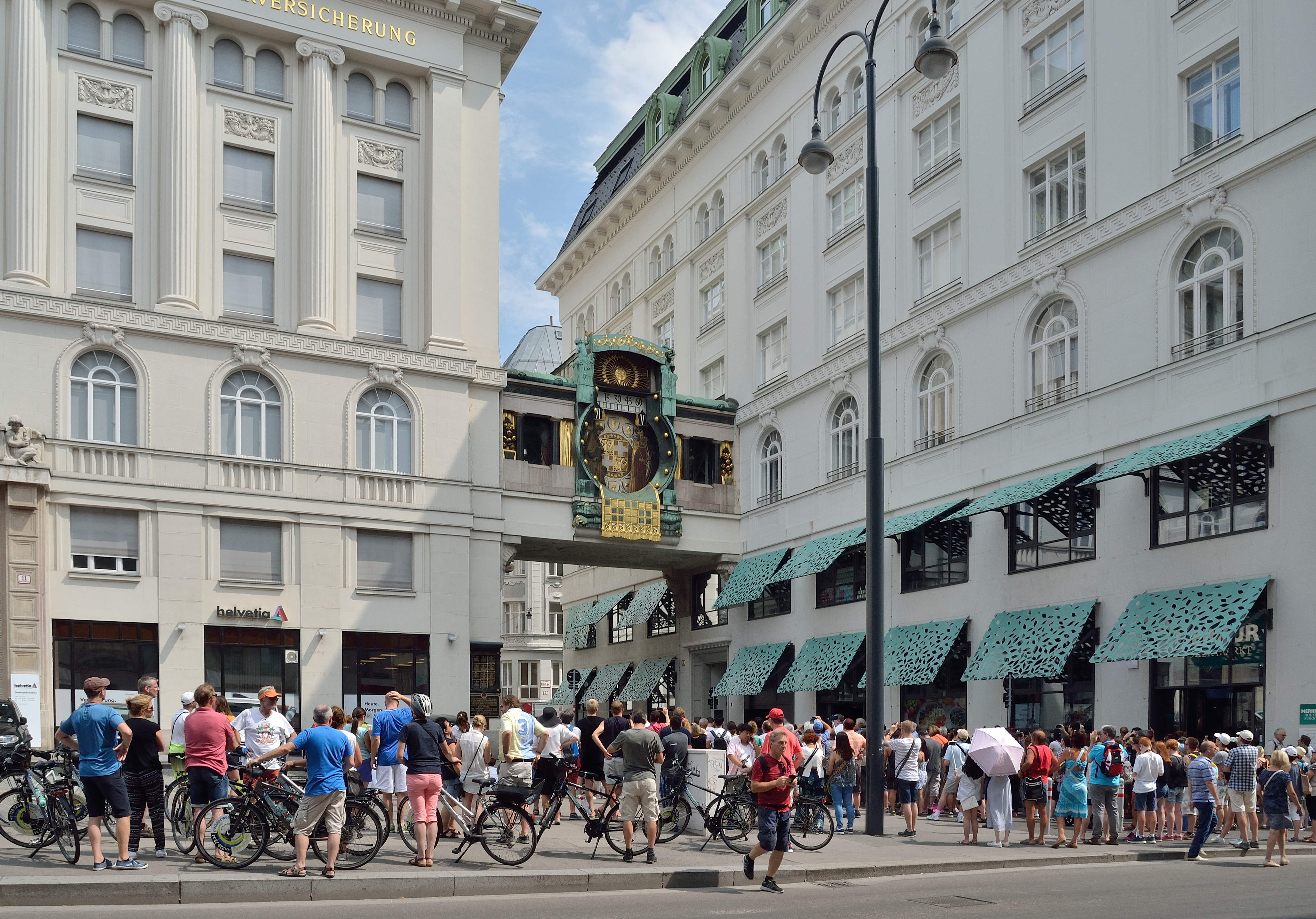 Einmal am Tag, um 12:00, vollführt die Ankeruhr am Hohen Markt ihren Figurentanz. Entsprechend viele ZuschauerInnen finden sich zu diesem Highlight eines Wien-Besuchs ein.